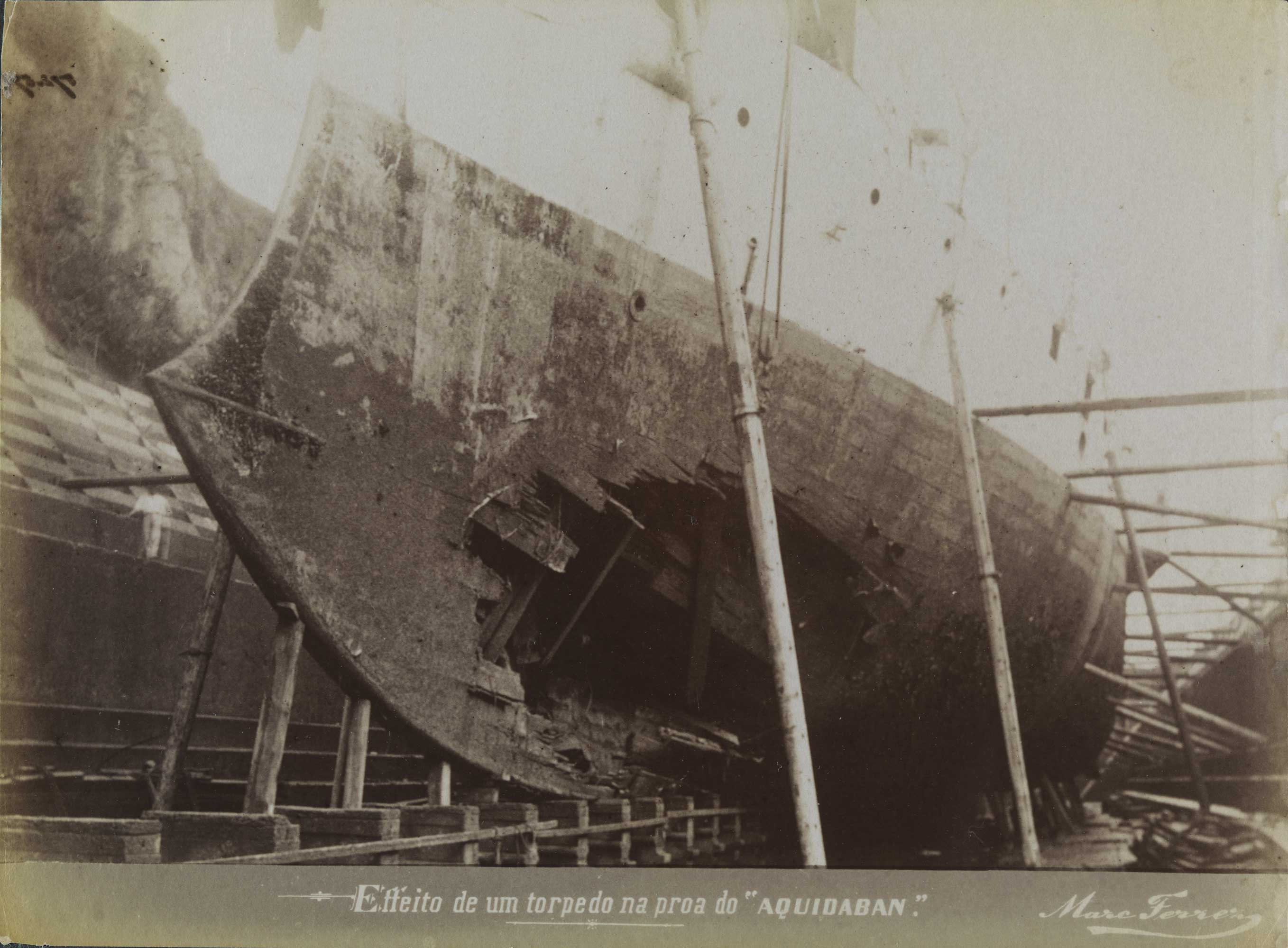 Effeito de um torpedo na proa do "Aquidaban"